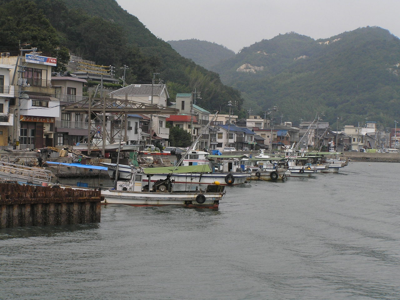 Kashira island in Bizen, Okayama,Japan 岡山県備前市日生町日生,頭島港